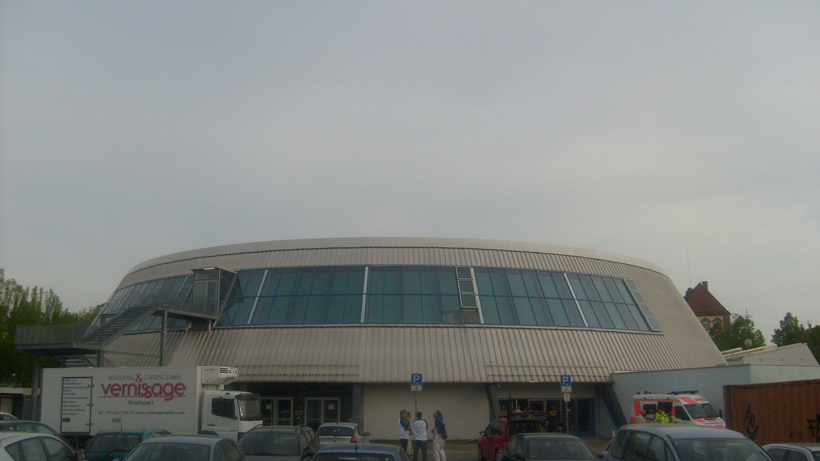 Außenansicht der Rundsporthalle Ludwigsburg